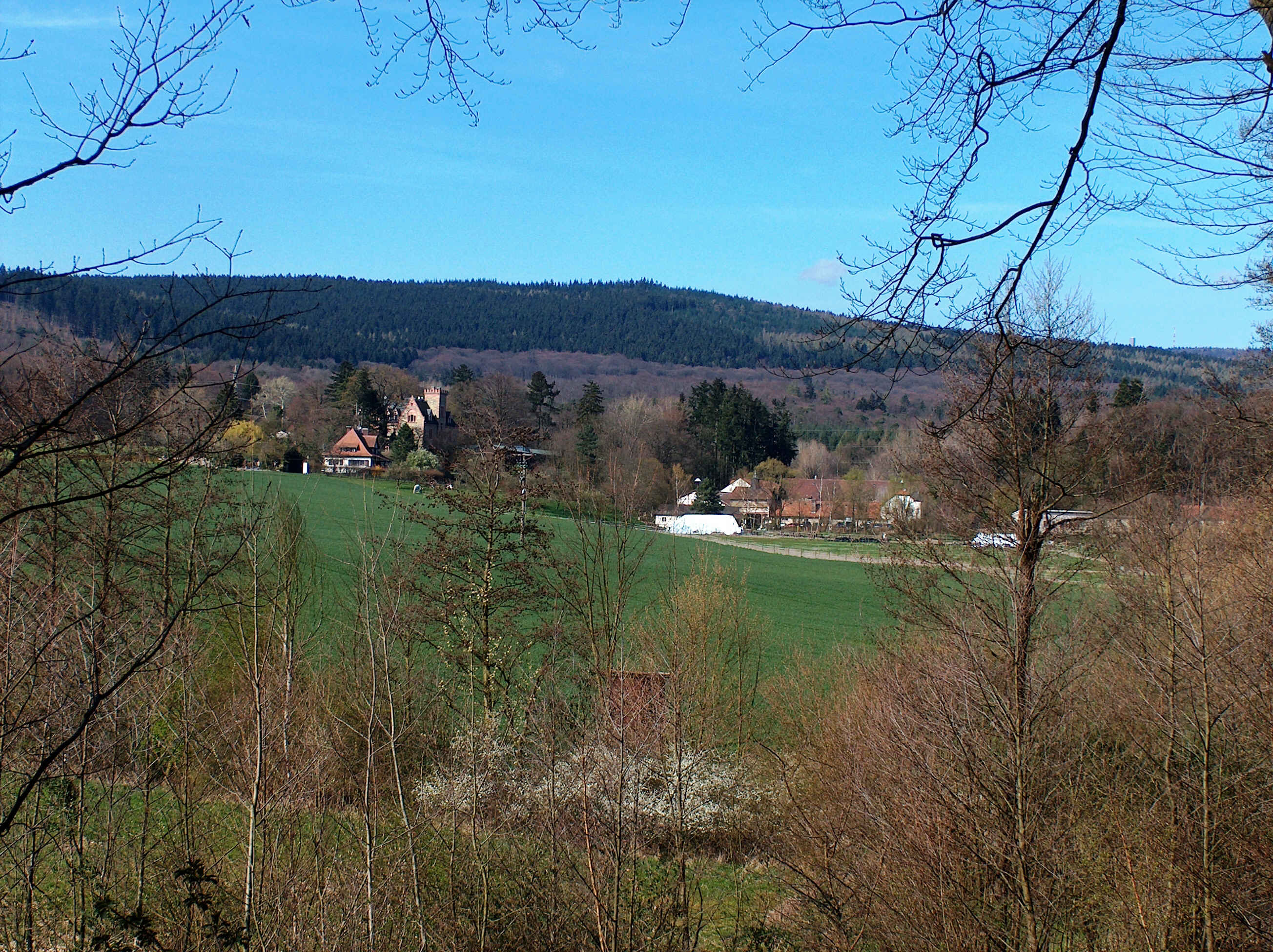 en.: Rettershof at Kelkheim near Frankfurt, Germany; dt.: Rettershof in Kelkheim bei Frankfurt/Main